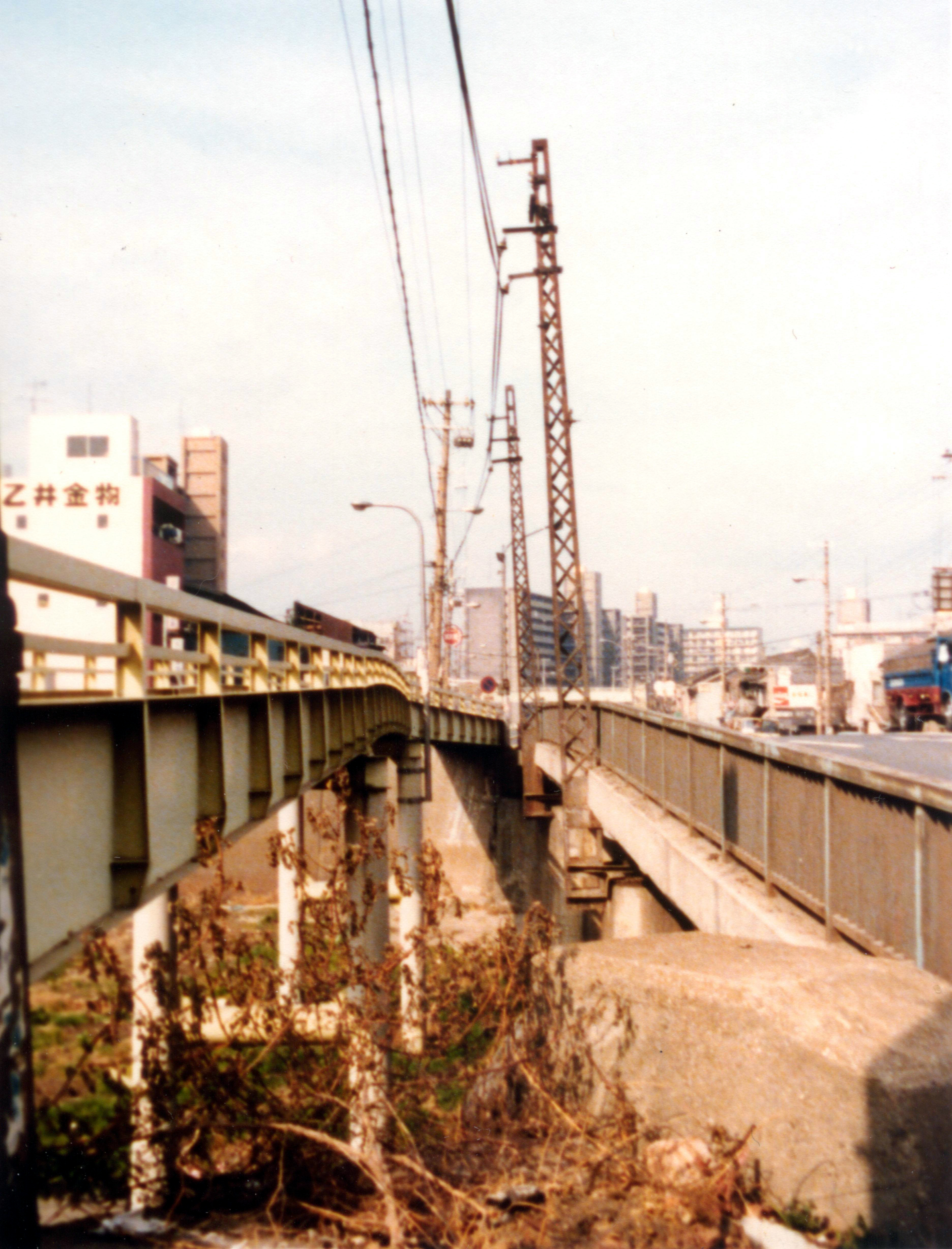 住之江橋（現：住之江大橋）に残っていた架線柱